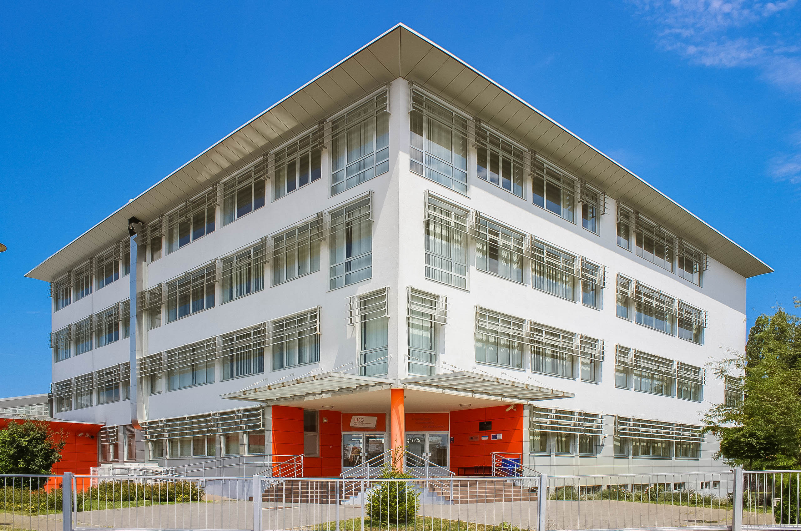 ugostiteljsko-turistička škola Osijek